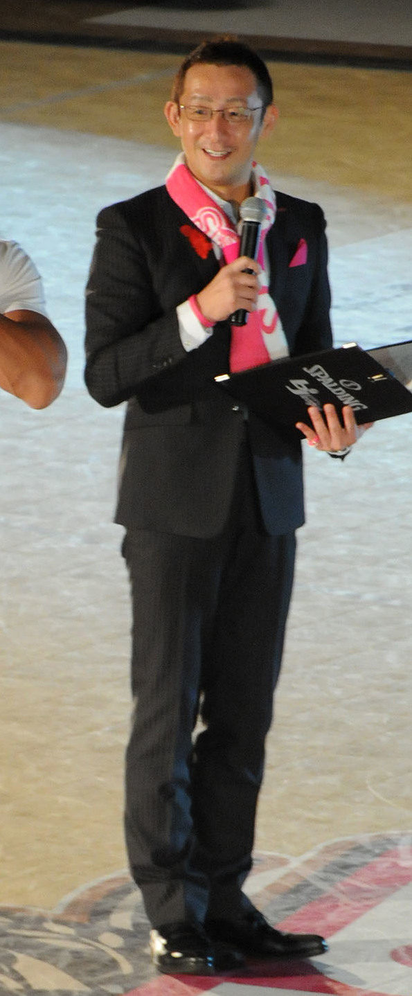 新日本プロレスの棚橋弘至選手。秋田県立体育館で。